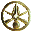 Insigne de béret d'infanterie